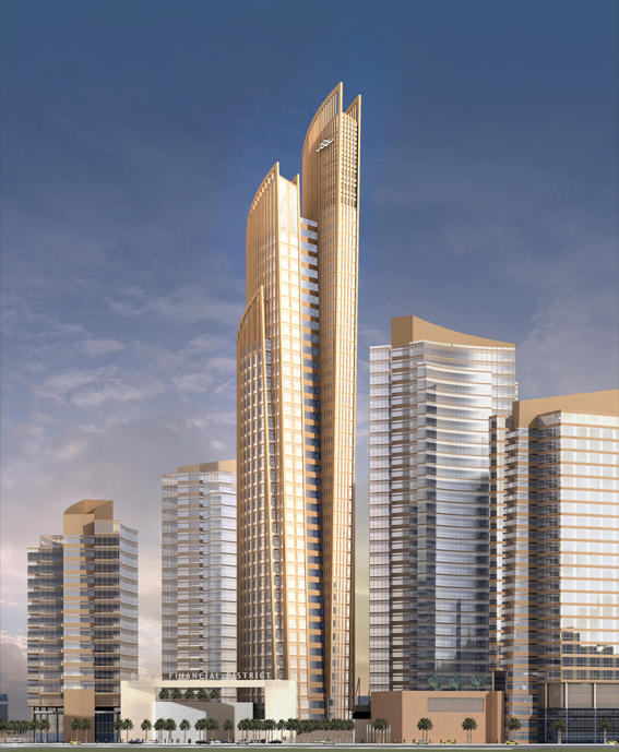 Büro- und Hotelkomplex in Katar